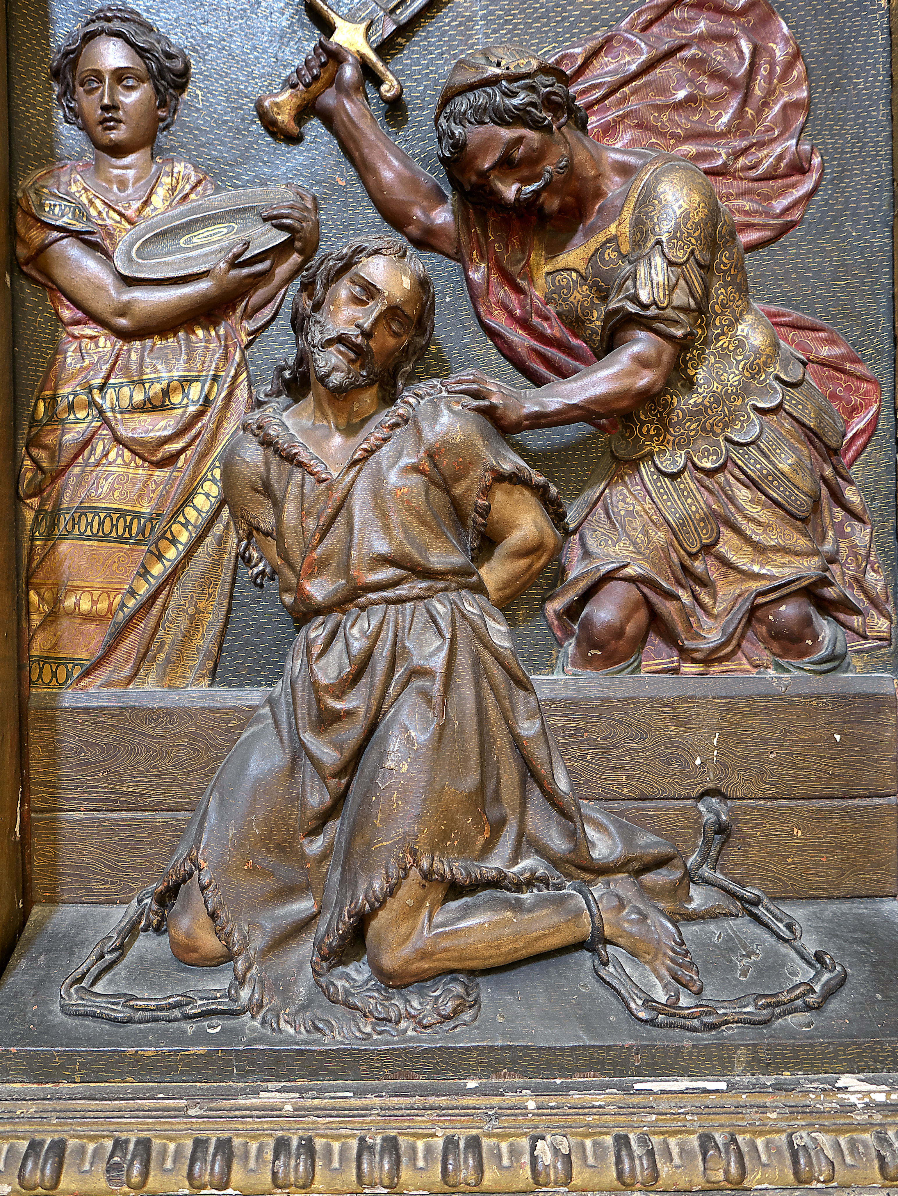 Iglesia de la Anunciación (Sevilla). Relieve del retablo de San Juan Bautista. Juan Martínez Montañés (1610).